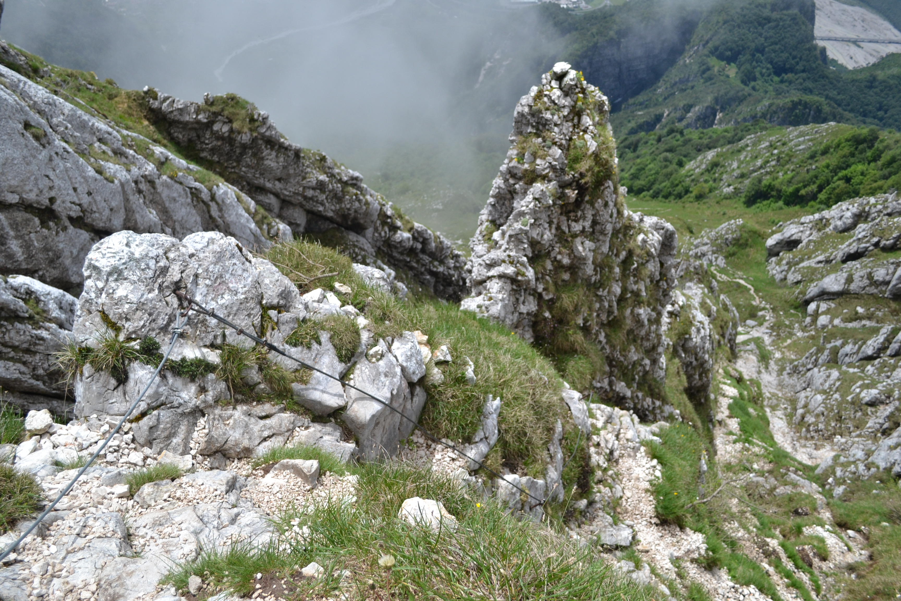 zajištěný výstupový žleb na cestě č. 414 v jižní stěně Monte Amariana